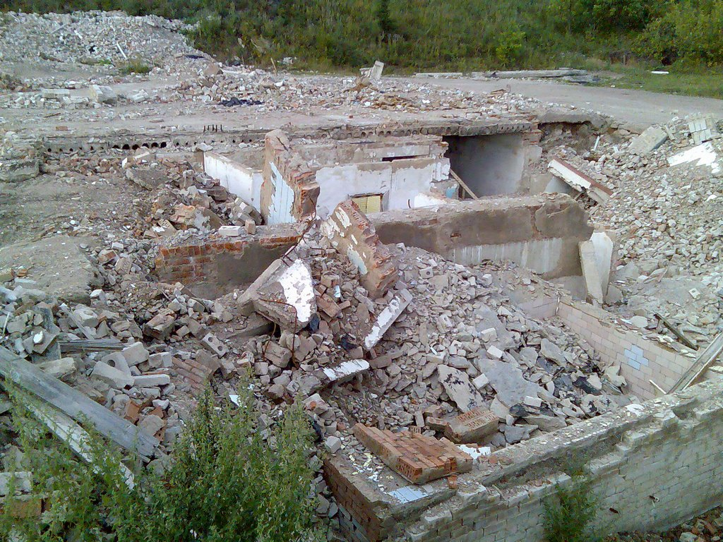 заброшенный полигон для испытания Мста-С в Ишимбайском и Гафурийском районах Башкортостана